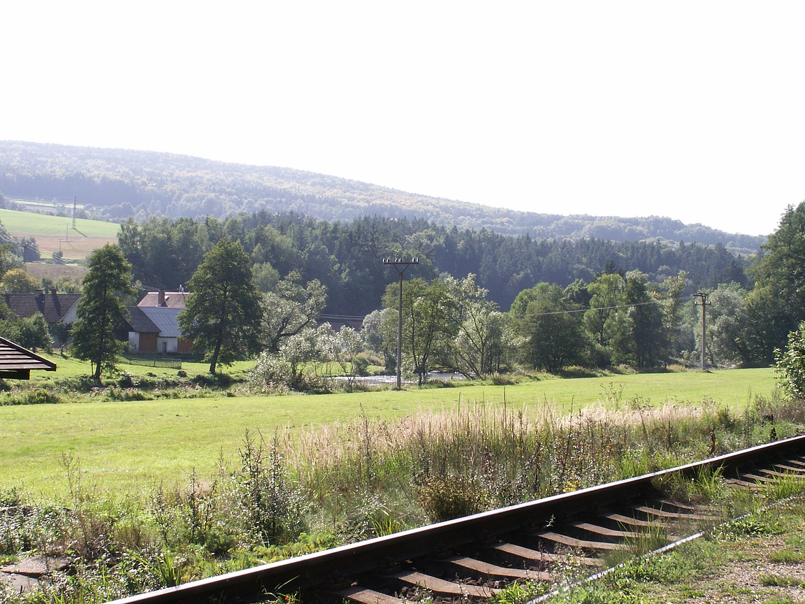 Stvořidla, zastávka Smrčná